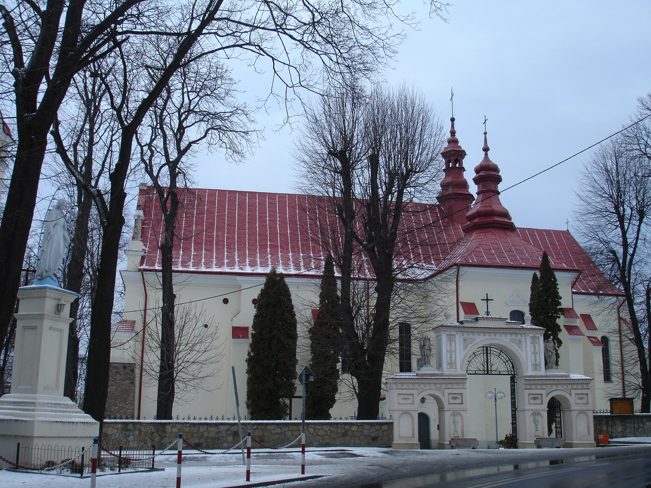 Dynów kościół